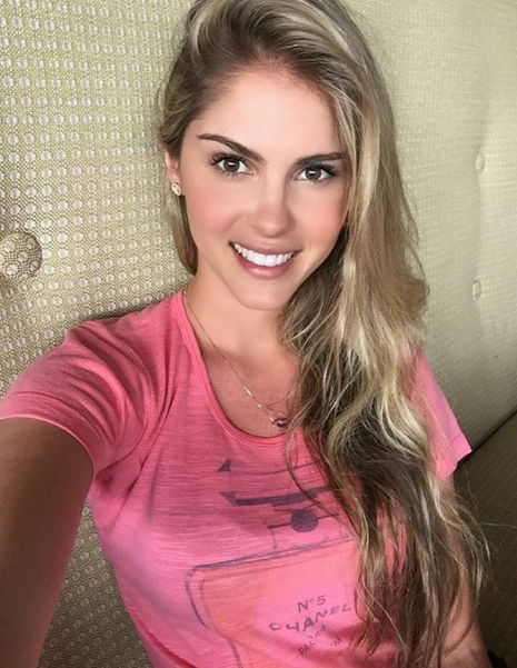 Bárbara Evans em dezembro de 2015.